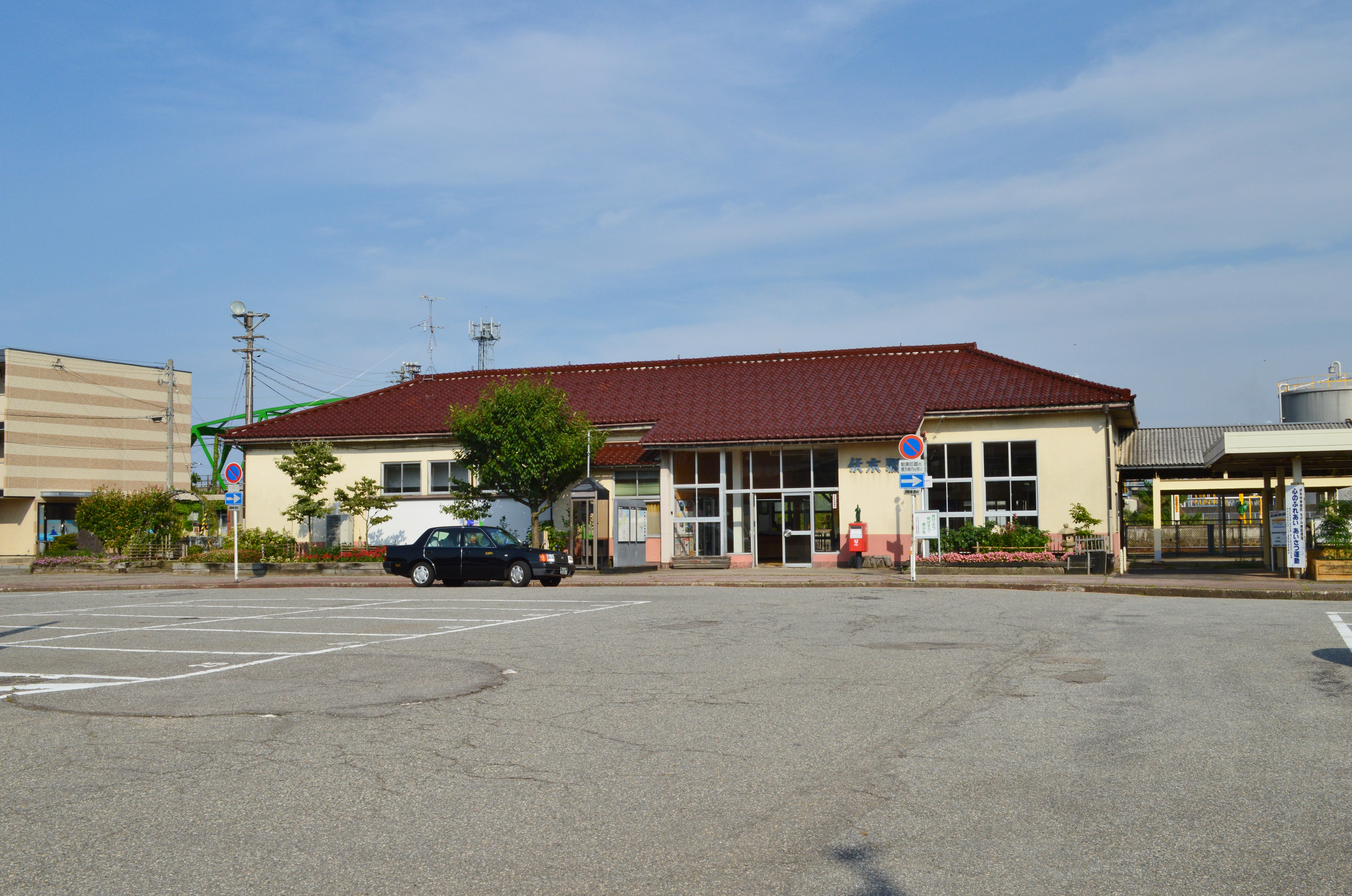 伏木駅 駅舎